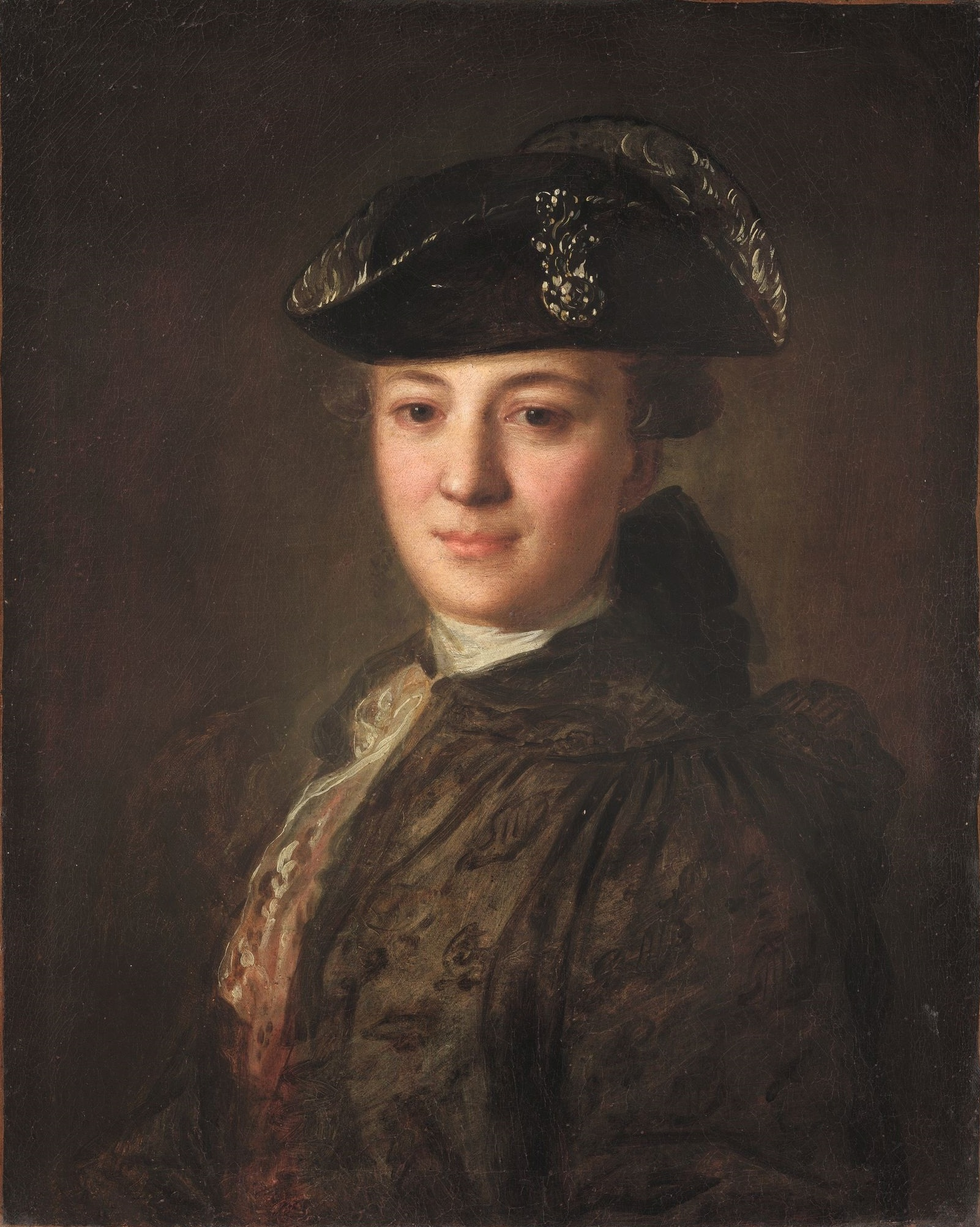 Данный портрет – одно из самых загадочных произведений Ф.С. Рокотова. Существуют две версии, содержащие предположения о личности героя. Согласно одной из них (по предположению Е.Н. Чижиковой), перед нами портрет графа А.Г. Бобринского, сына Екатерины II и ее фаворита Г.Г. Орлова. Другая точка зрения (согласно предположению И.М. Сахаровой) основана на данных рентгенограммы, показавшей, что произведение написано поверх изображения молодой женщины, лицо которой полностью сохранено в поздней живописи и без изменений вошло в портрет «неизвестного». Художник переделал лишь позу и костюм. Маскарадный мужской костюм еще более нивелирует изображенную личность. По-видимому, на портрете изображена О.С. Балбекова, первая жена Н.Е. Струйского.